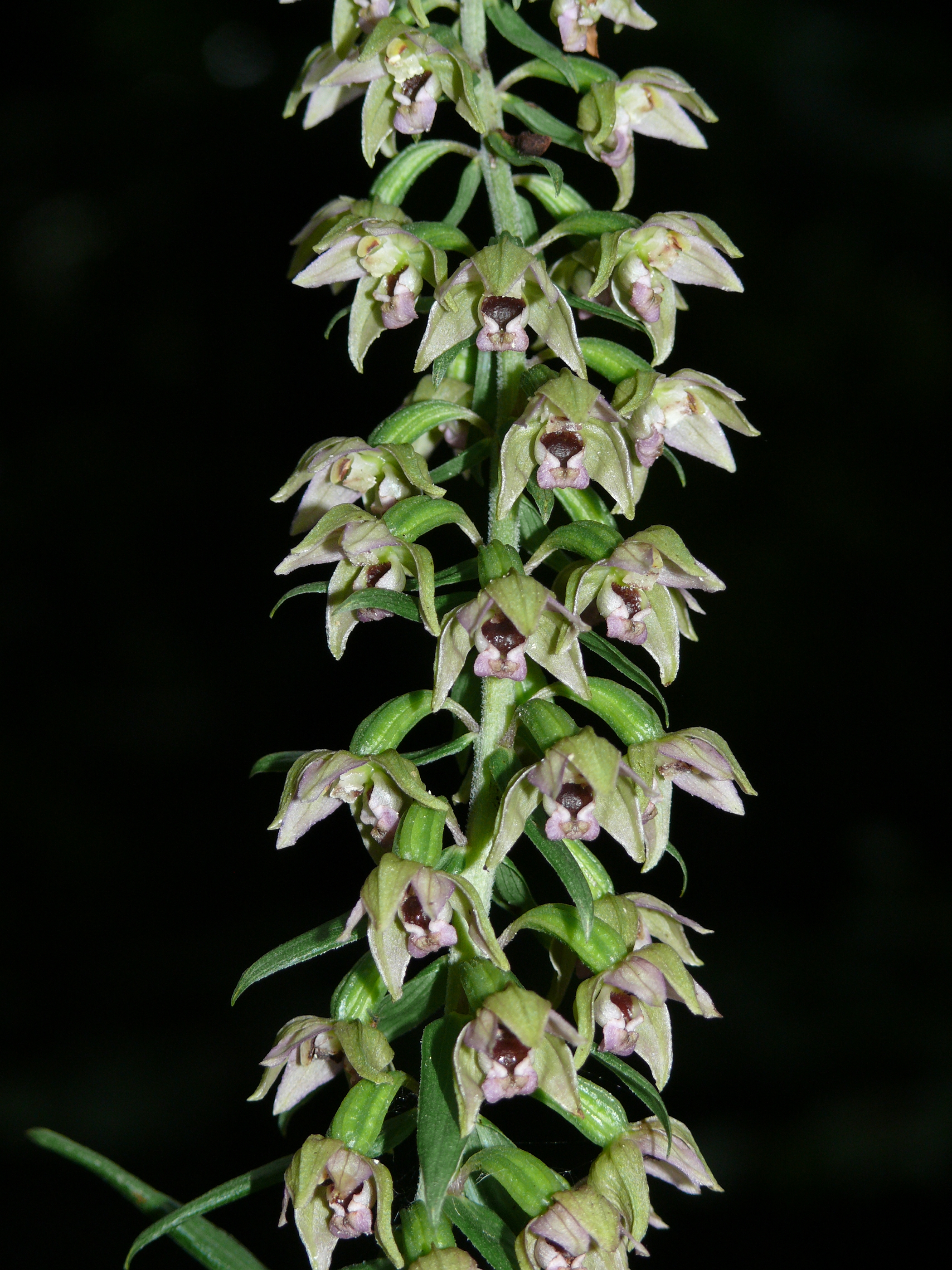 Epipactis helleborine, Schwäbisch-Fränkische Waldberge, Deutschland